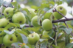 Pomme Antonovka - Apple